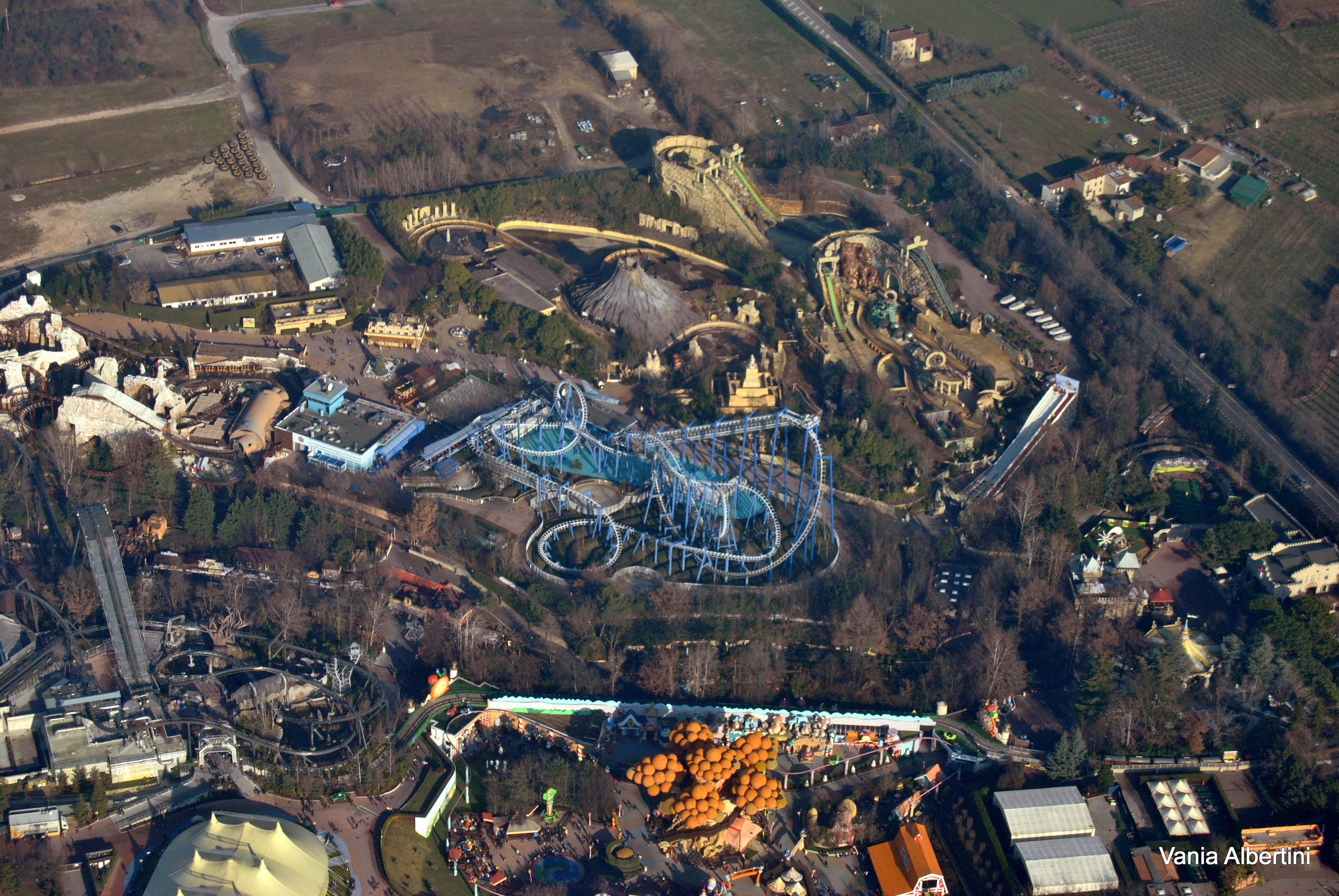 Il parco divertimenti n.1 in Italia: Gardaland! Da una visuale un po' particolare. This is a photo of a monument which is part of cultural heritage of Italy.